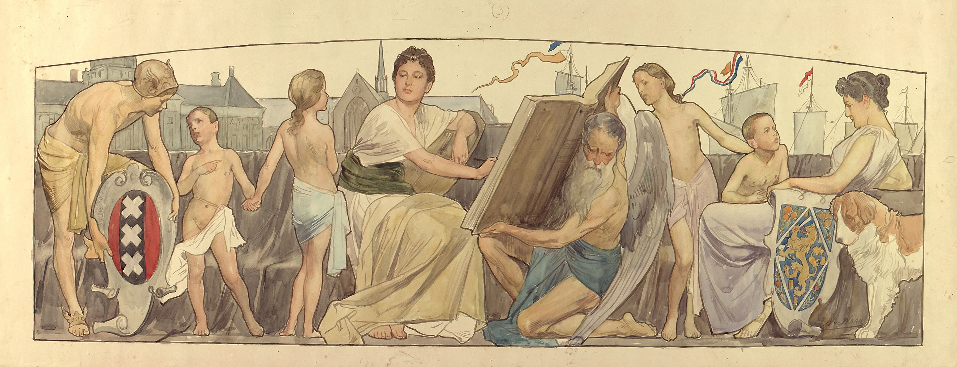 Ontwerptekening door Nicolaas van der Waay voor de beschildering van de achterkant van de Gouden Koets. De achterkant verwijst naar het Verleden: de muze van de geschiedschrijving tekent de volkshulde voor Wilhelmina op in het boek van de tijd.